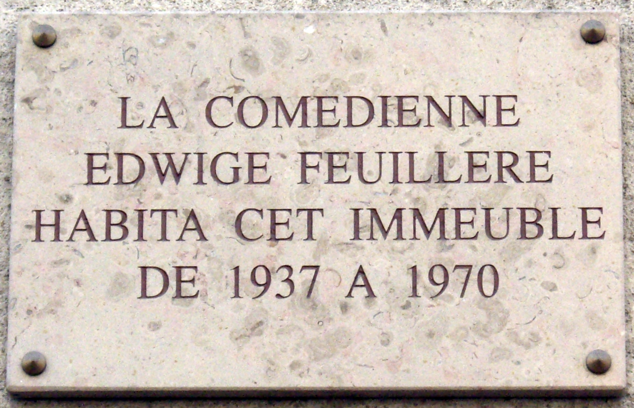 Plaque apposée au n° 16 de l'avenue de La Bourdonnais, Paris 7e, où habita la comédienne Edwige Feuillère (1907-1998) de 1937 à 1970.